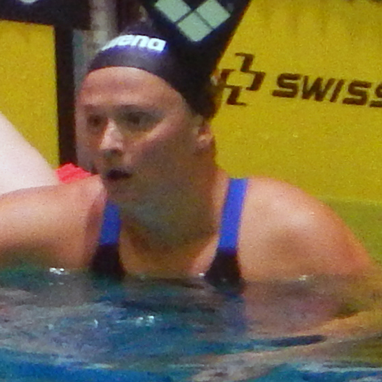 Мария Асташкина (слева) и Виталина Симонова (справа) на чемпионате России по плаванию 2018